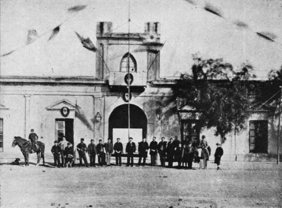 Ingreso a la Fortaleza Protectora Argentina, ubicada al sur de la Provincia de Buenos Aires.